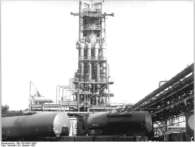 Zentralbild-Schmidt Ri 24.10.1957 Leuna-Werke UBz.: Blick auf eine Erdöl-Hydrieranlage.